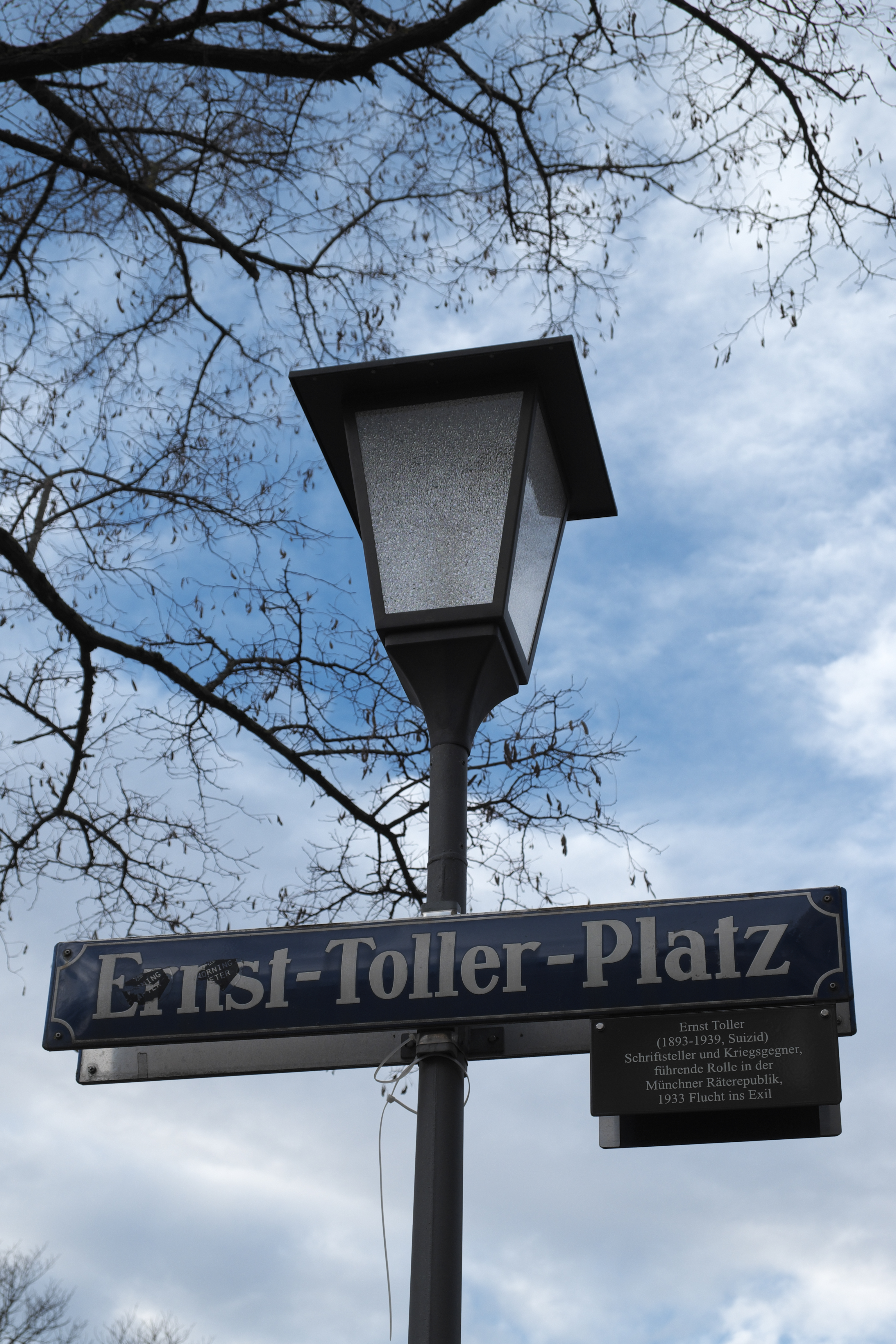 Straßenschild Ernst-Toller-Platz in Schwabing (Stadtbezirk Schwabing-Freimann) in München (Bayern/Deutschland)